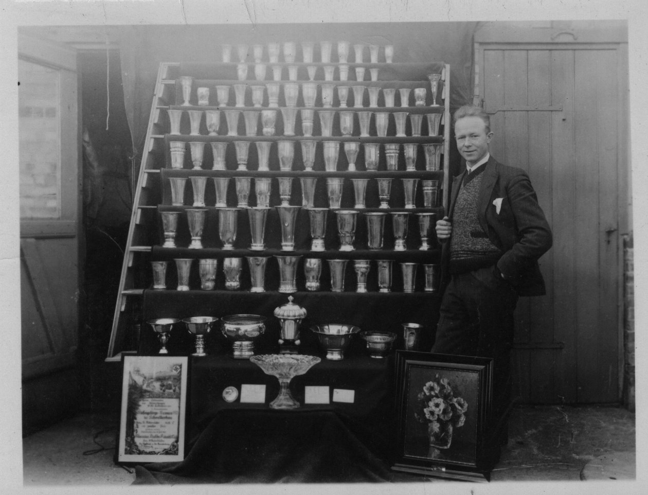 Præmier 1934, hjemme i baggården.